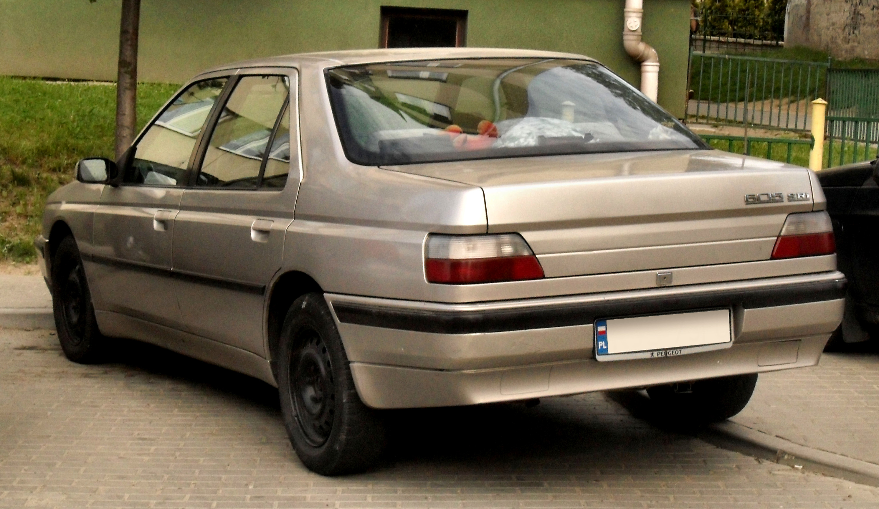 Peugeot 605 SRi w Jaśle.